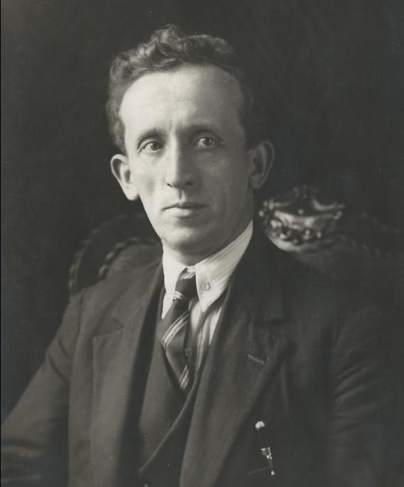 Jaro Procházka (1886-1949), český malíř